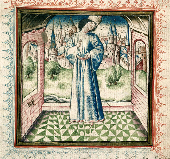 ChampionDesDames-Miroir de la Mort-Carpentras410-f22d : L'auteur priant pour le salut de tous